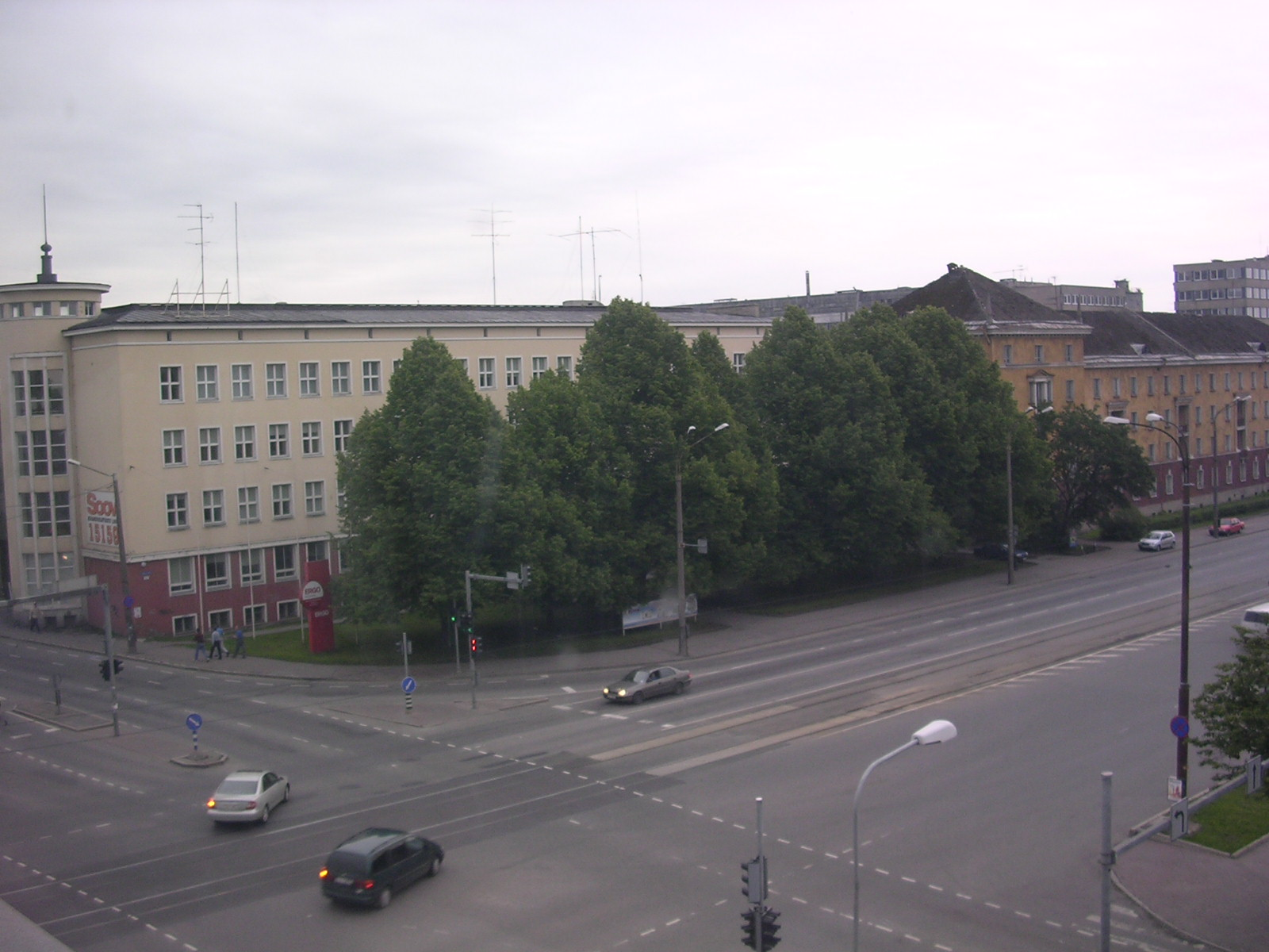 Pärnu mnt ja Liivalaia ristmik